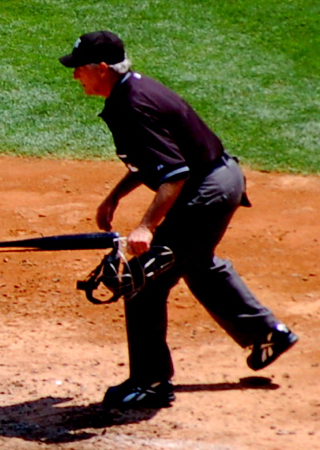 Mike Reilly